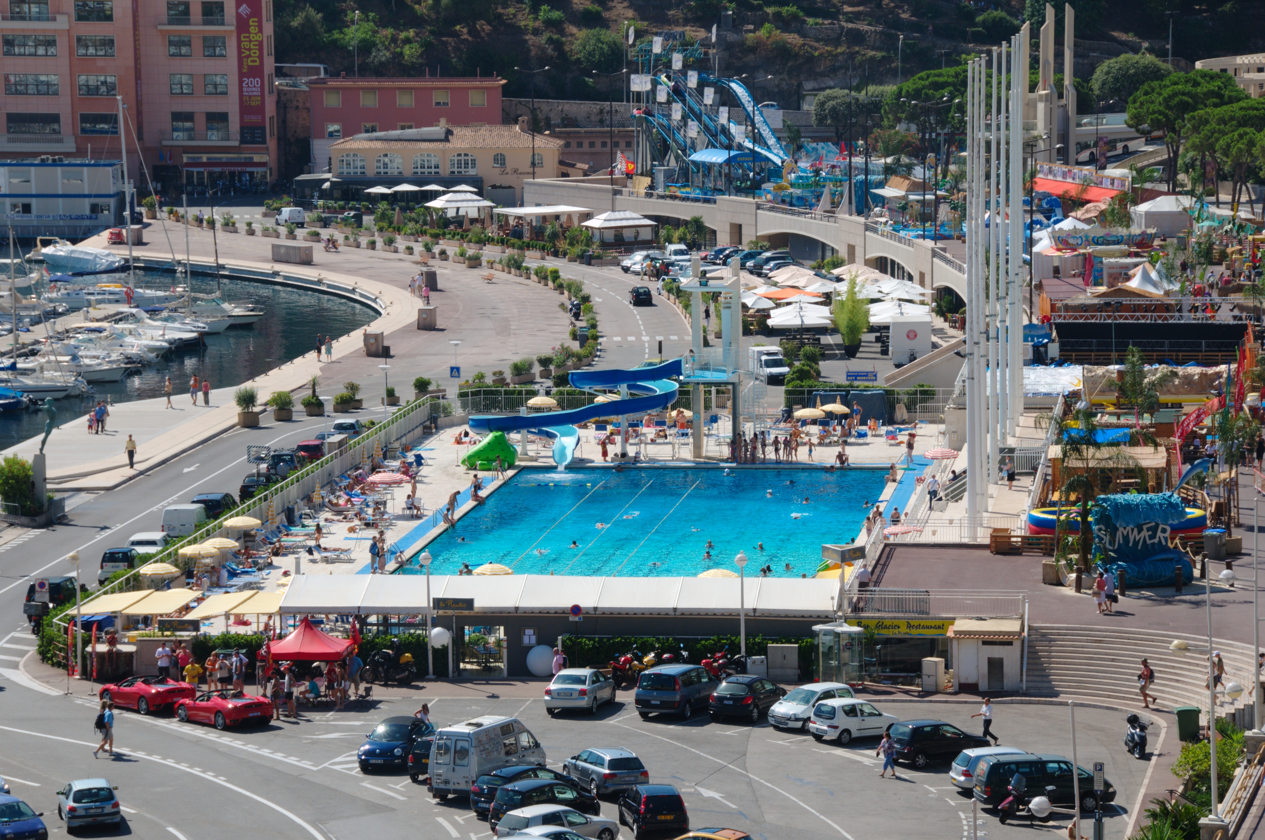 Piscinne de Monaco, Stade Nautique Rainier III